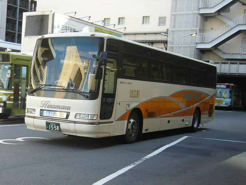 登録番号 鳥取22か15-18 日の丸自動車所属 メリーバード号用 2007年10月21日 広島バスセンターにて撮影